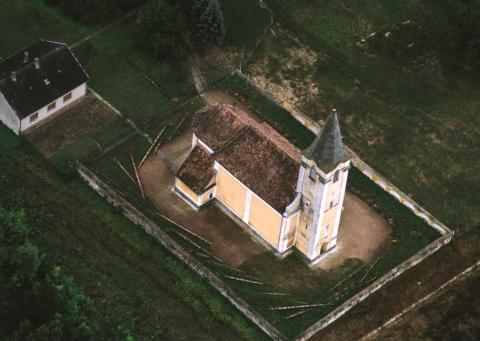 Gyümölcsoltó Boldogasszony római katolikus templom Kehidakustány